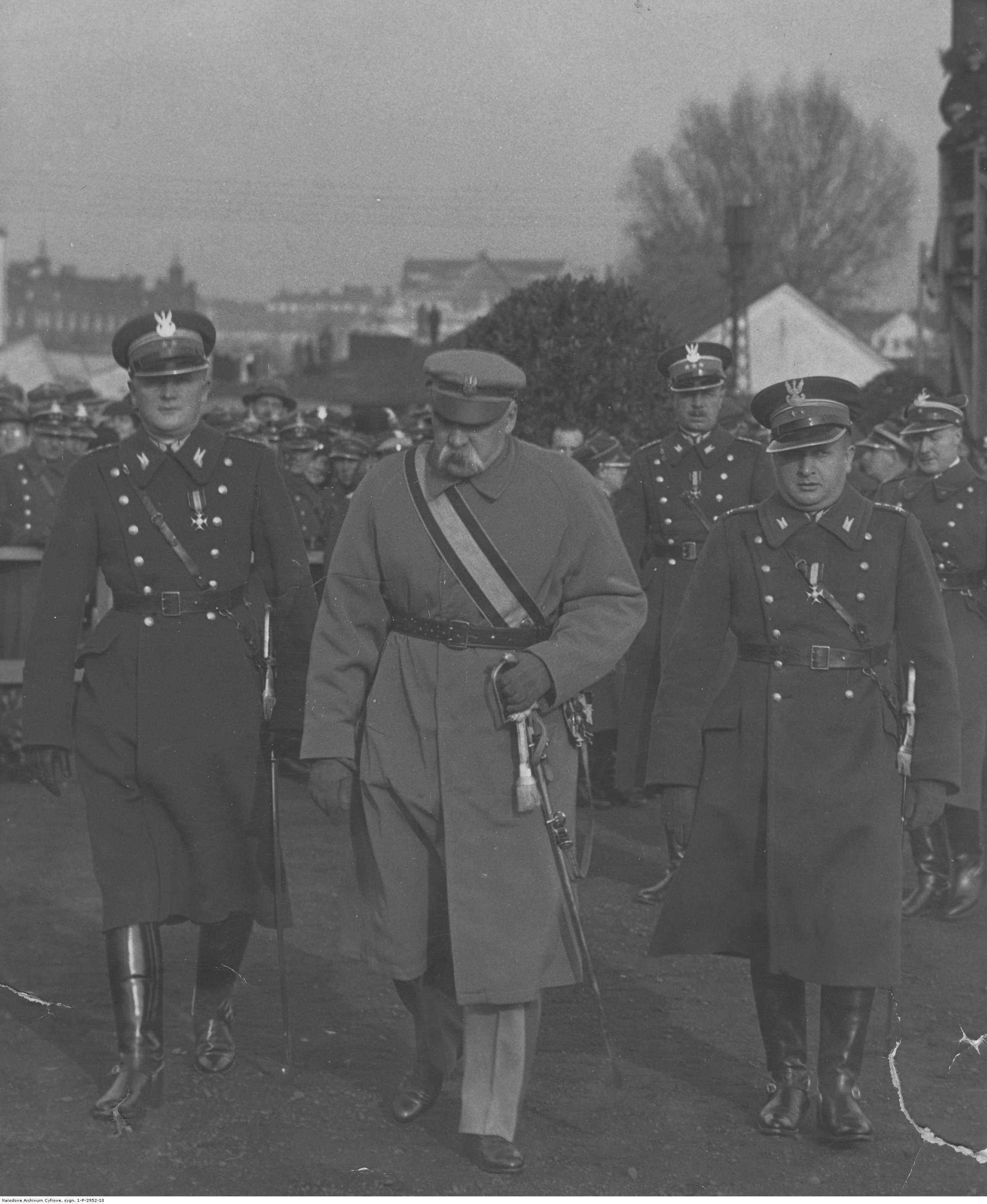 Obchody Święta Niepodległości w Warszawie w 1933 r. Marszałek Józef Piłsudski, szef gabinetu ministra spraw wojskowych podpułkownik Adam Sokołowski (po lewej) i adiutant marszałka podpułkownik Kazimierz Busler (po prawej). Koncern Ilustrowany Kurier Codzienny - Archiwum Ilustracji. Sygnatura: 1-P-2952-10